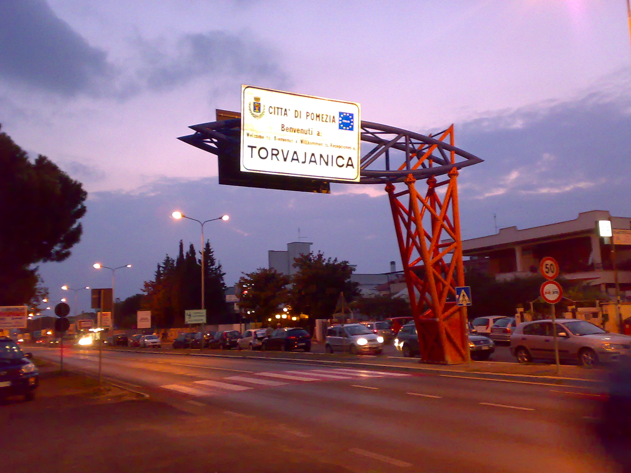 Foto scattata da me stesso con il mio cellulare